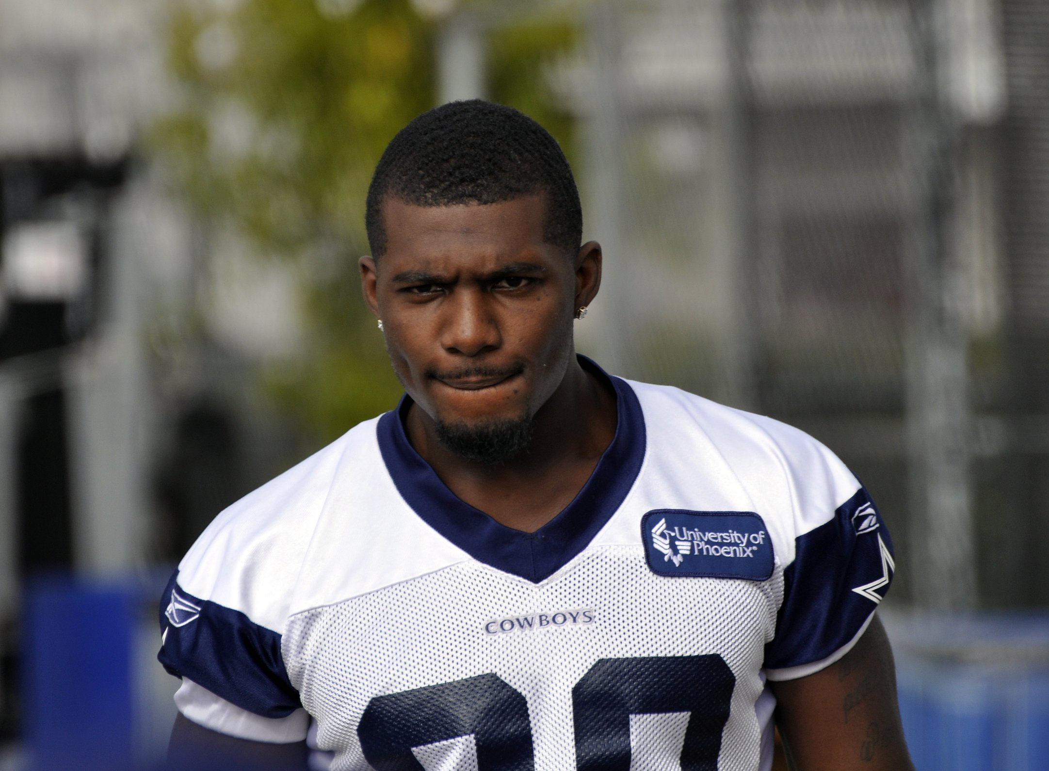 WR Dez Bryant